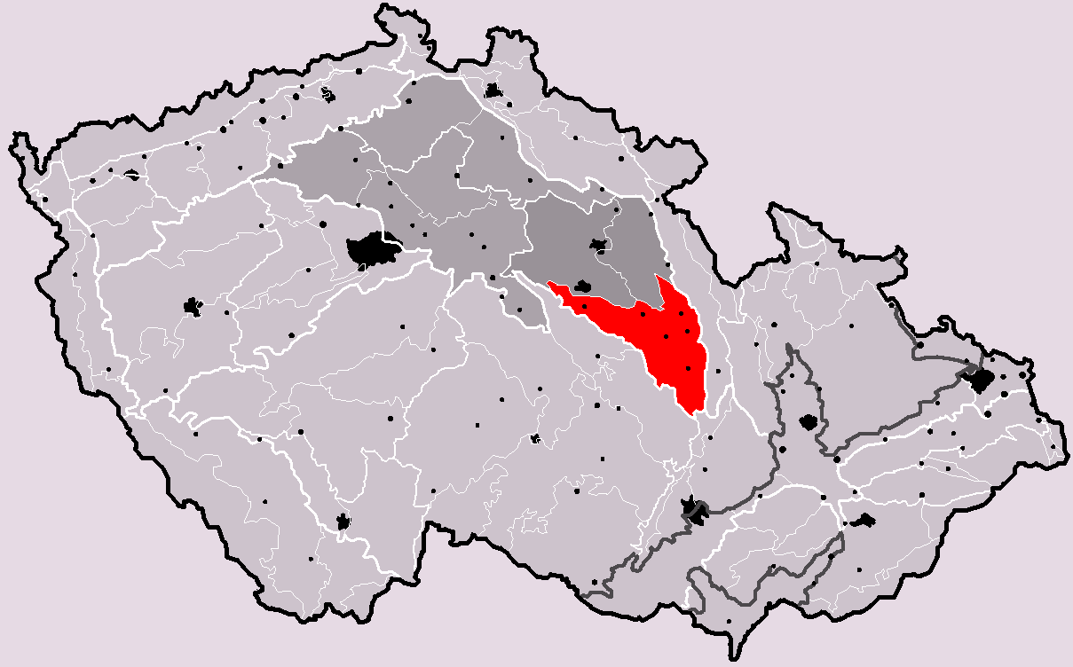 Poloha geomorfologického celku Svitavská pahorkatina v rámci České republiky. Hercynský systém Hercynská pohoří I Česká vysočina I6 (VI) Česká tabule I6C (VIC) Východočeská tabule I6C-3 (VIC-3) Svitavská pahorkatina